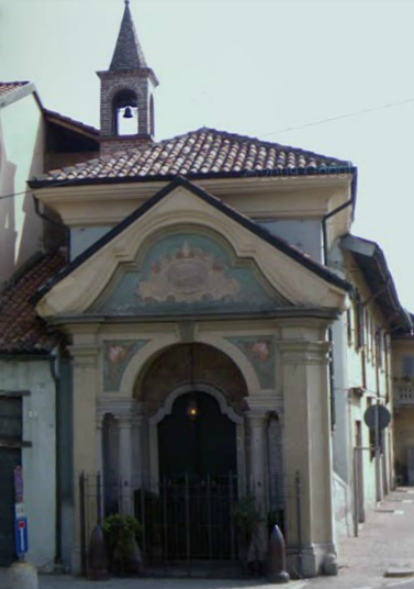 La cappella di San Maiolo a Robecco sul Naviglio (MI) - Italy